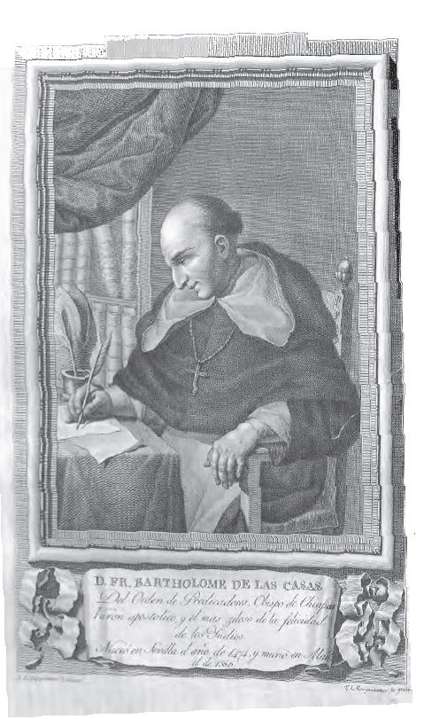 Retrato de Bartolomé de las Casas.